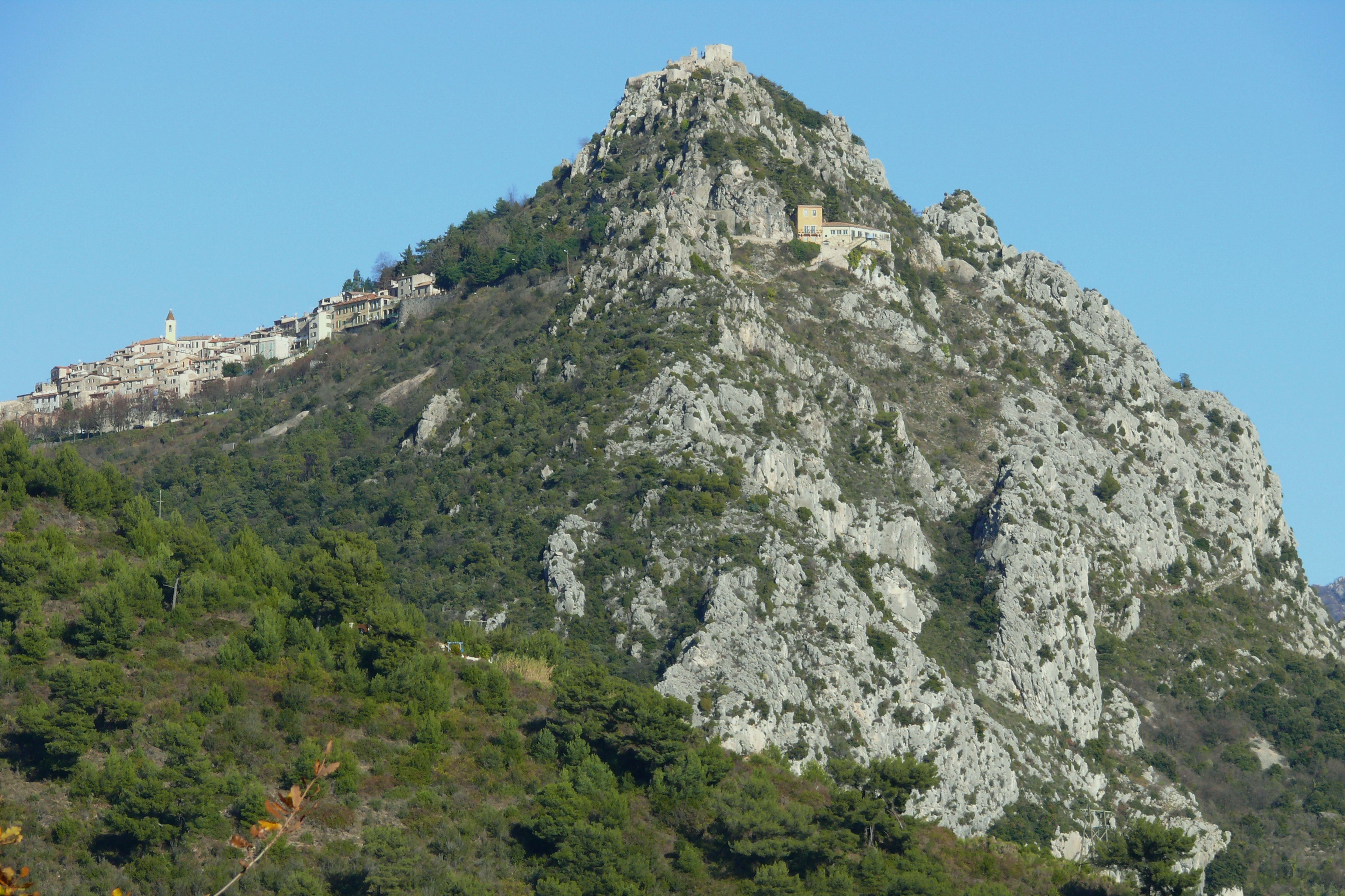 Le site du village de Sainte-Agnès vu depuis la route de Gorbio